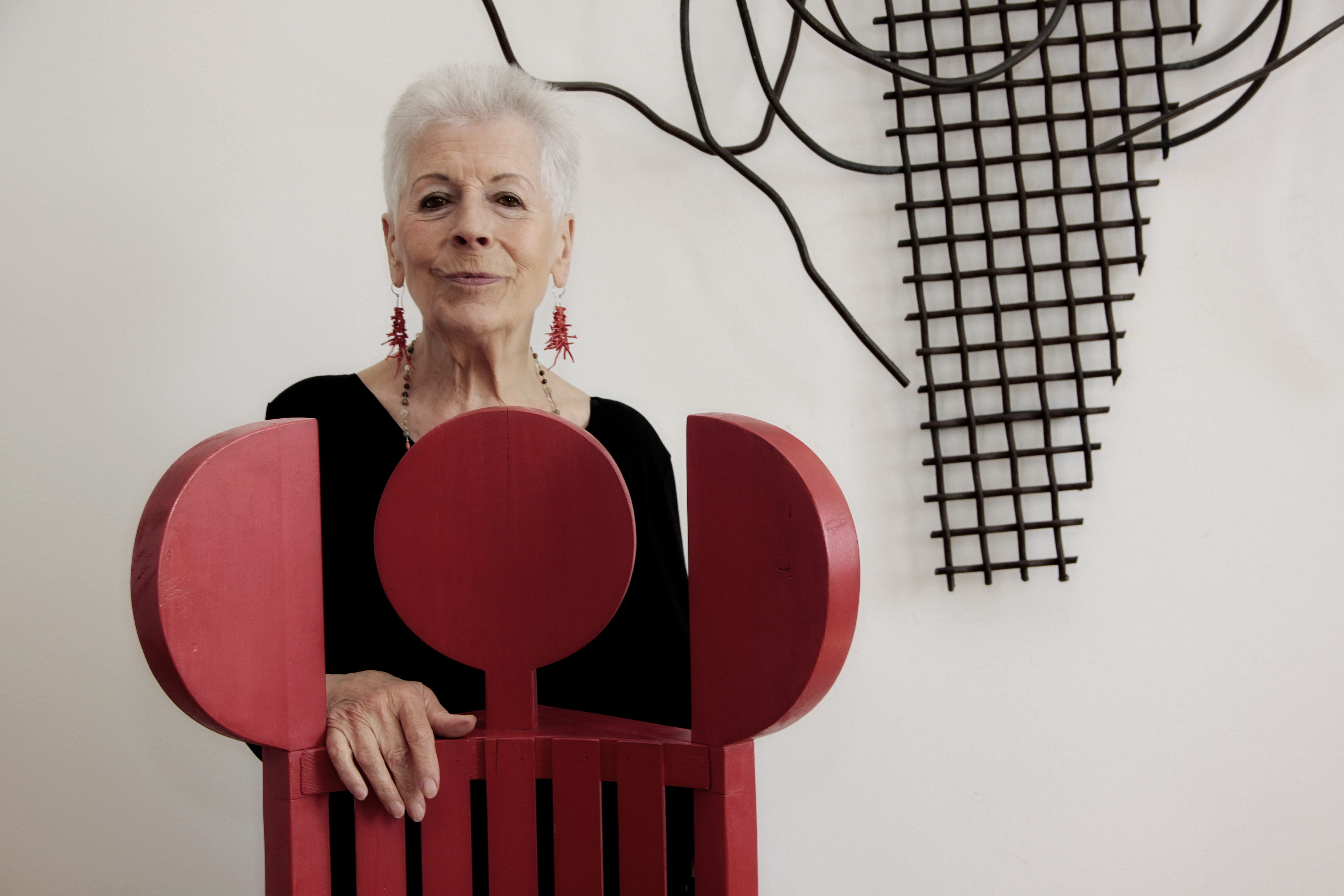 Bildhauerin